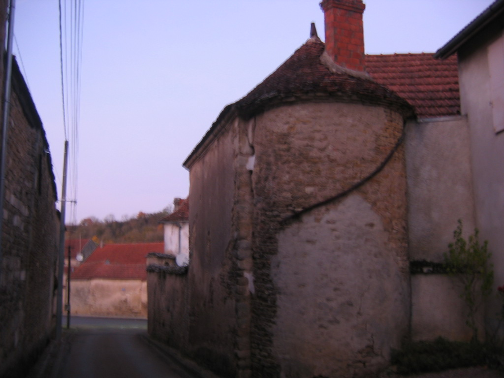 les restes du vieux château